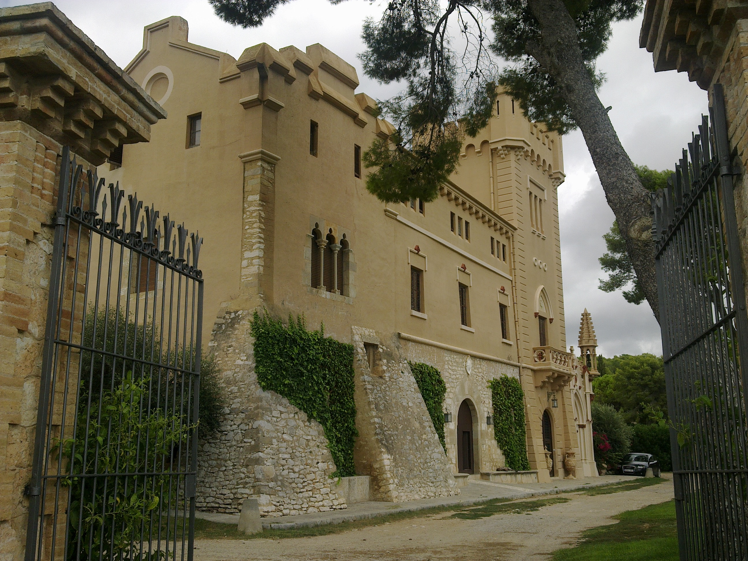 Torre del veguer. Historicisme segles XIV - XV - XIX